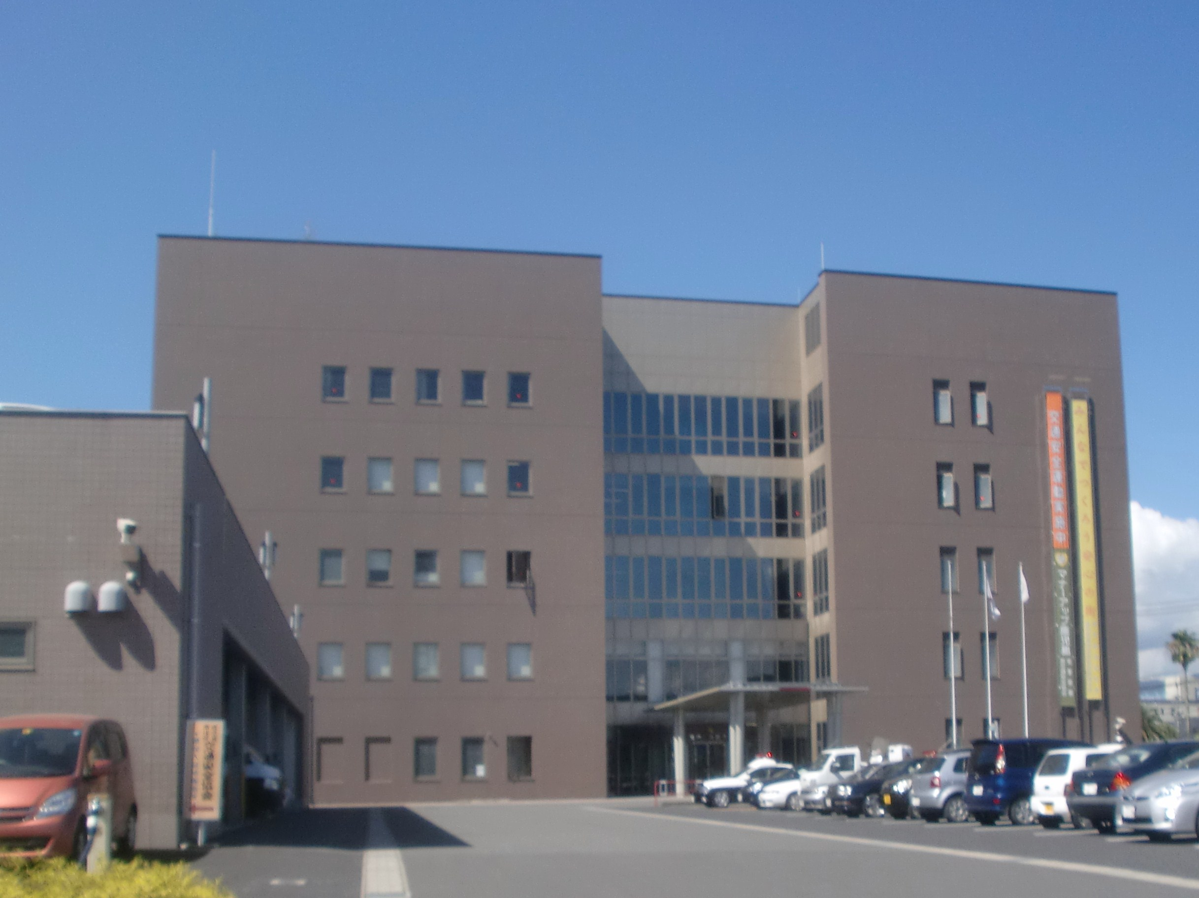 鹿児島南警察署の外観。